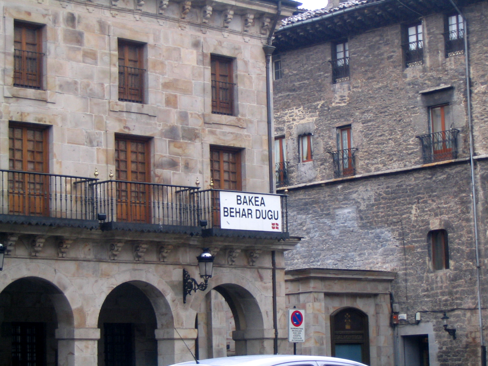 Vue partielle de la mairie de Bergara (Guipuscoa (Pyrénées).